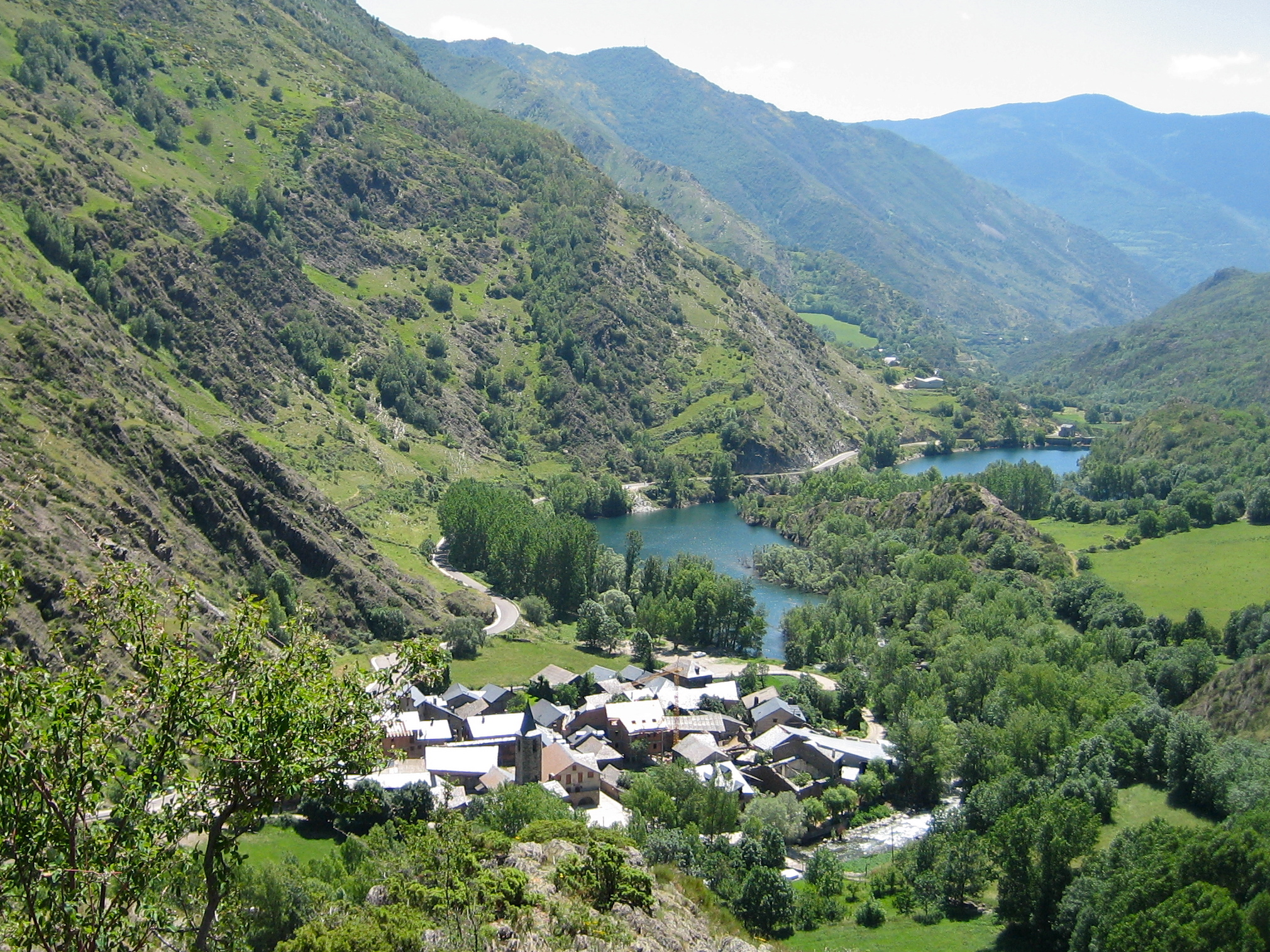 Borén, Pallars Sobirà, Catalunya